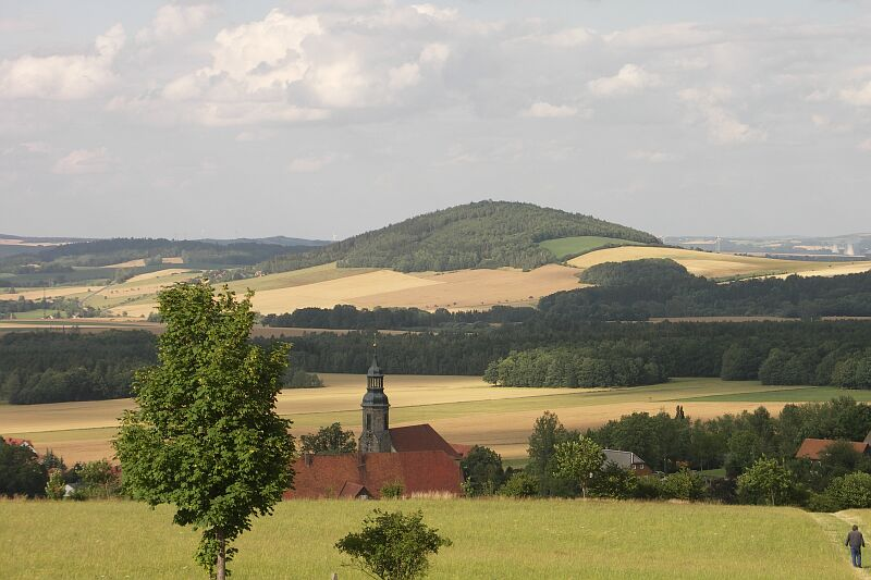 Breiteberg, Saxony, Germany